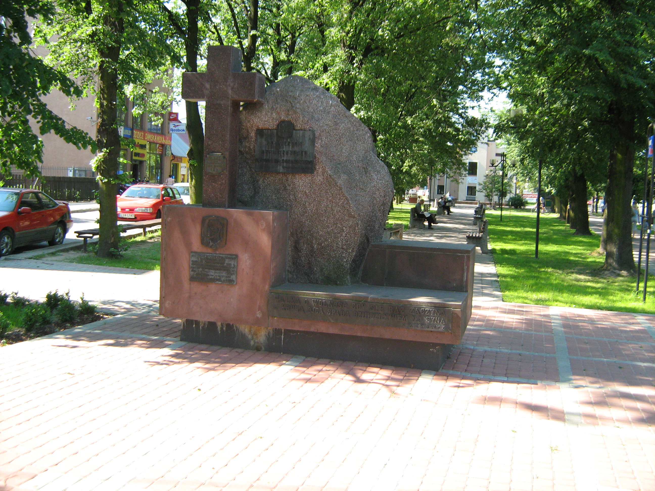 Pomnik Armii Krajowej w Parku Solidarności w Biłgoraju